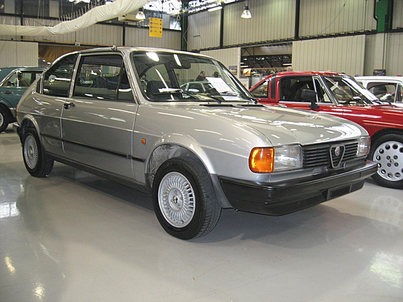 Subject:Alfa Romeo Alfasud Mk2